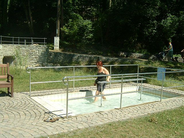 Frau im Kneippbecken beim Wassertreten. Das Becken befindet sich in Kronberg am Taunus bei den Kronthaler Quellen.